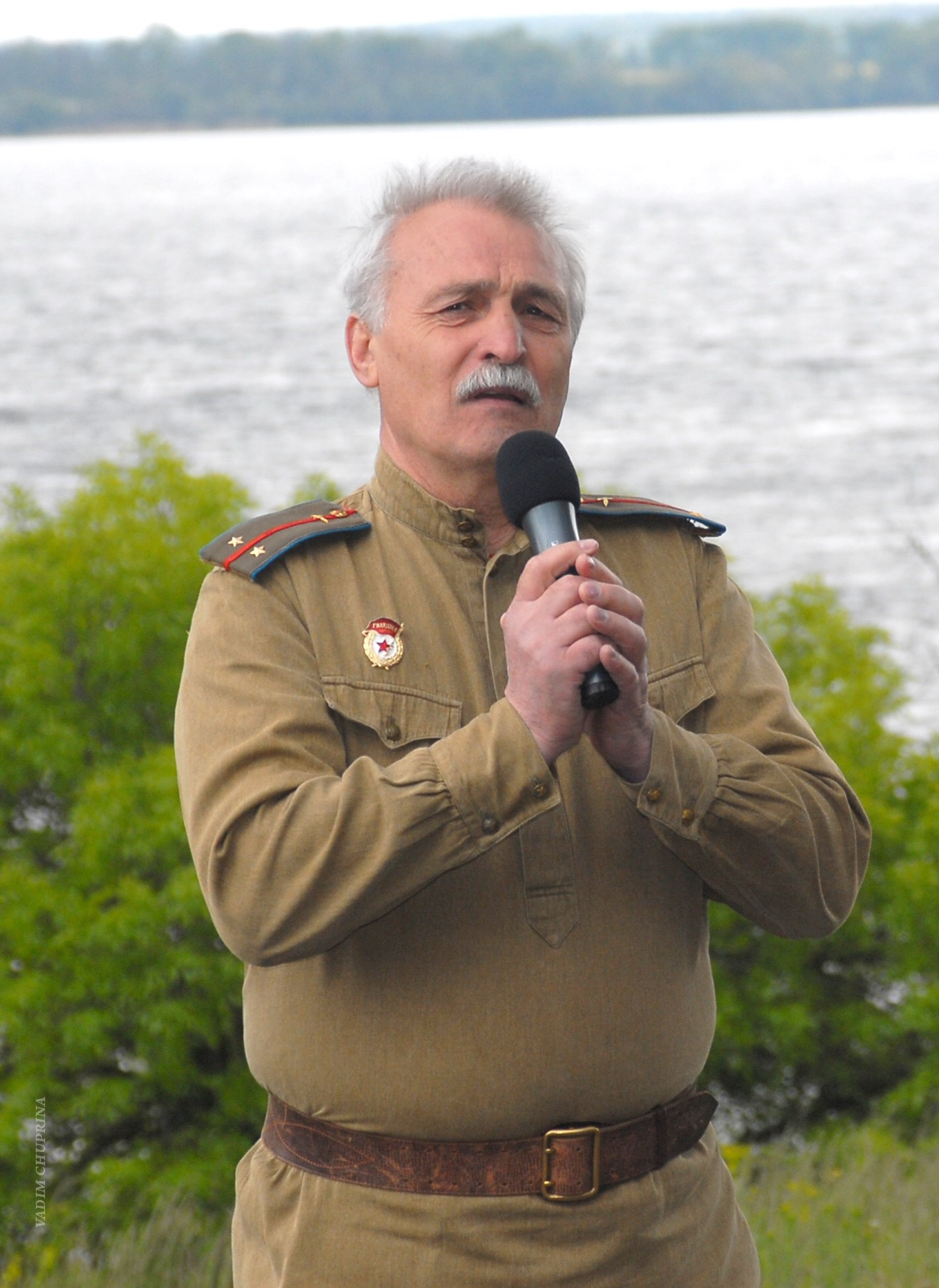 Пащенко Вилорий Иванович , фото Чуприна Вадим